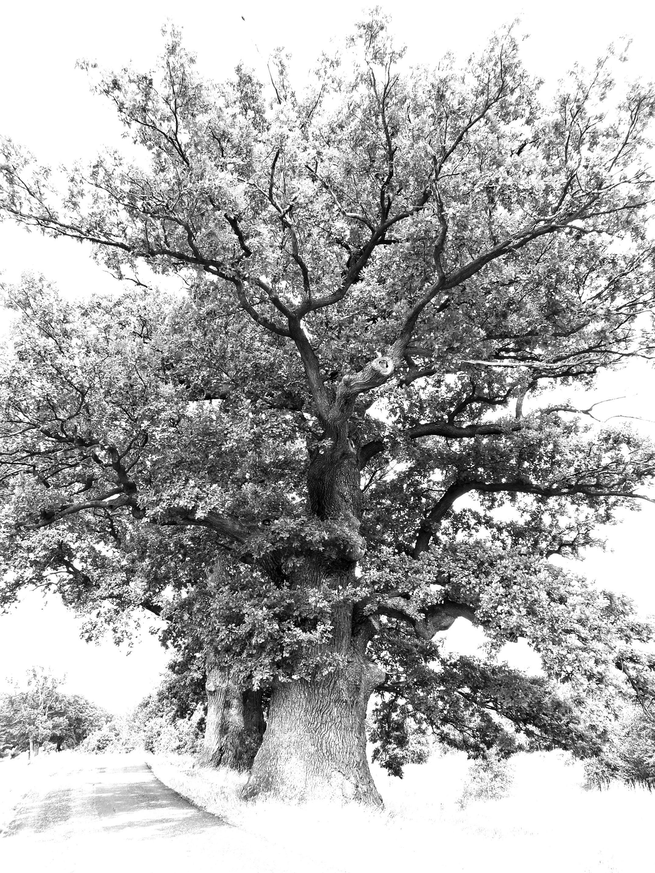 Pomnik przyrody w Nowej Bogacicy (woj. opolskie) This photograph shows a natural monument of Poland registered under number 65 (list)